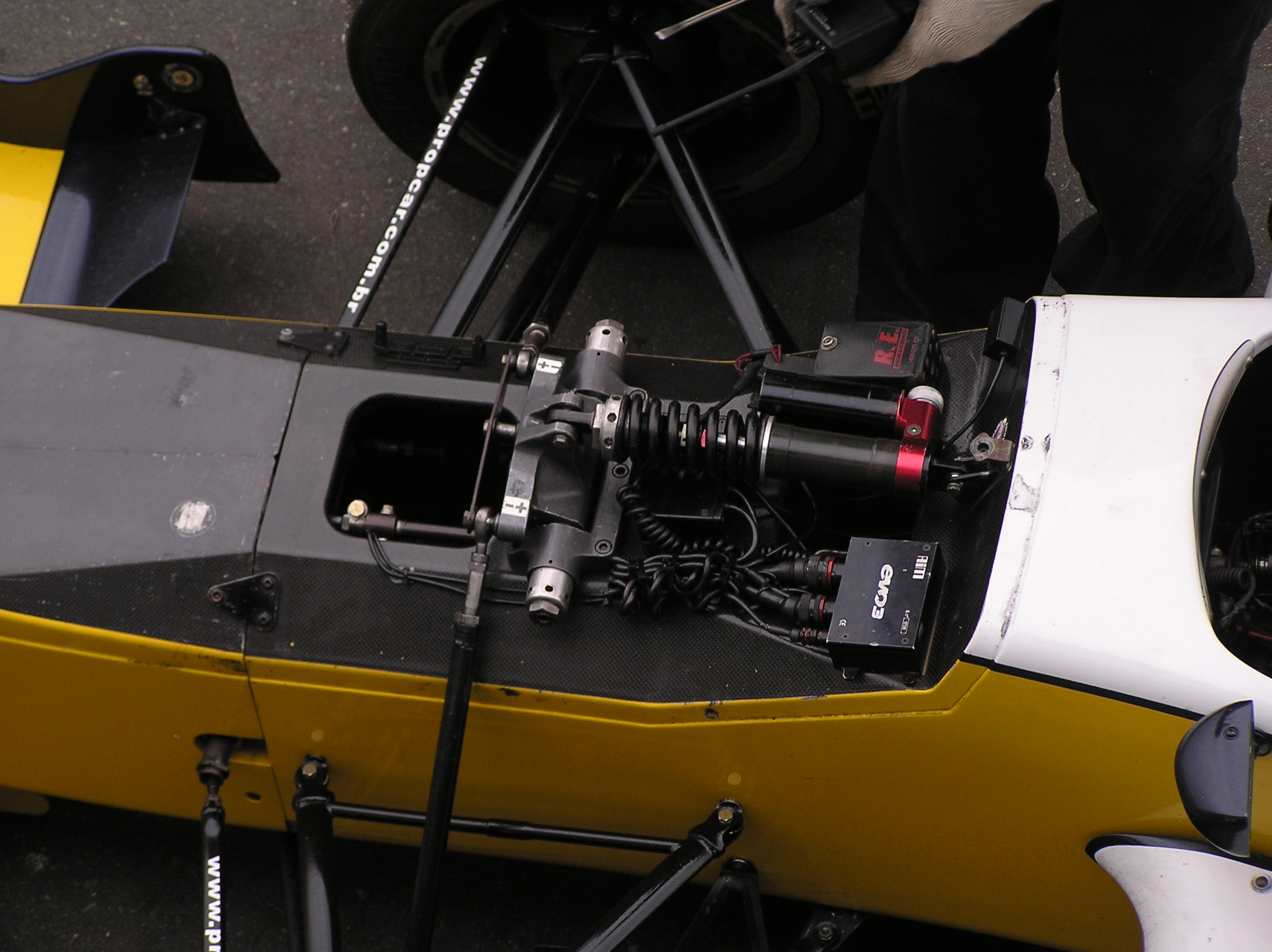 Formula Renault front